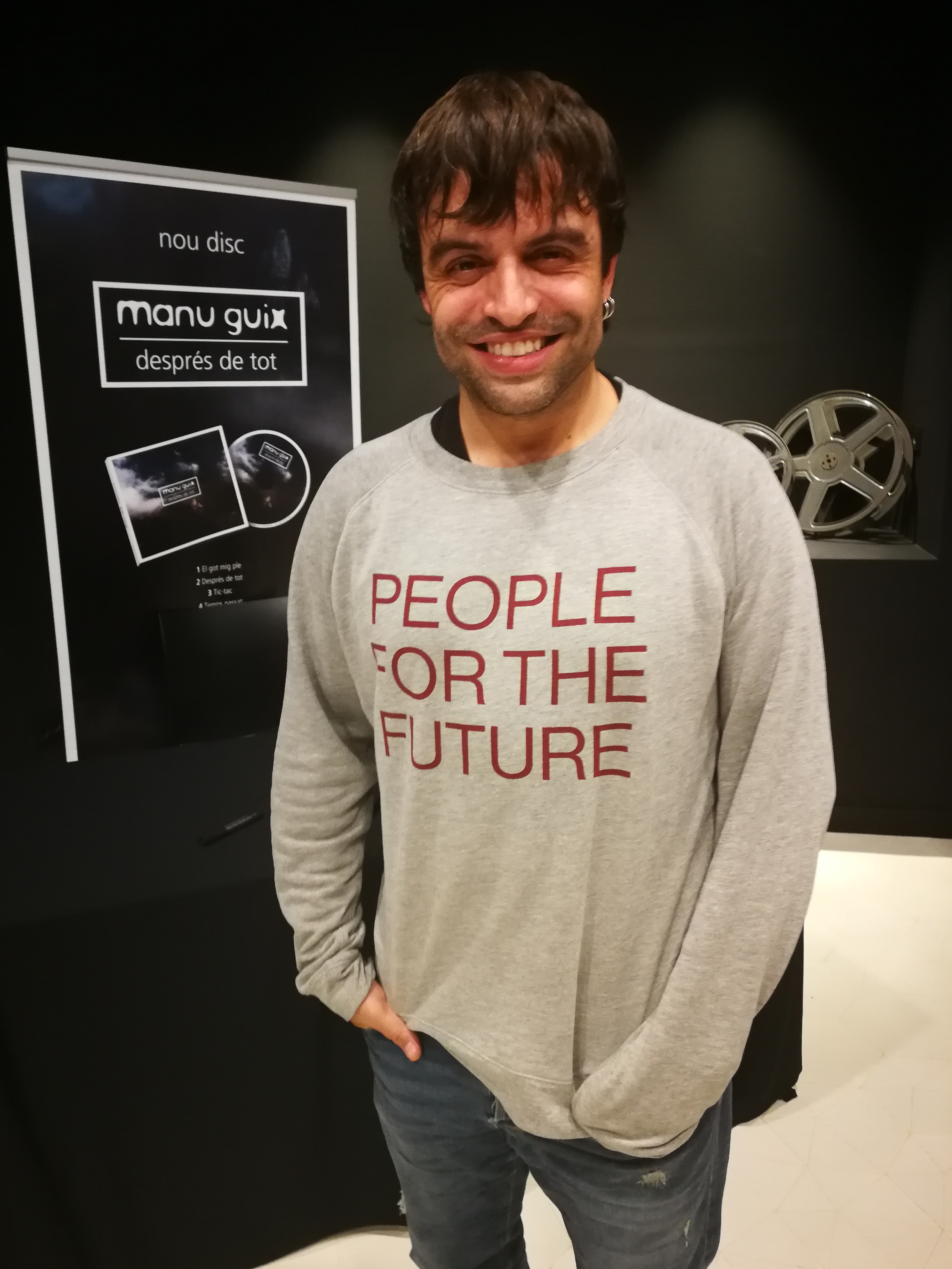 Manu guix a l auditori Valentí Fuster de Cardona